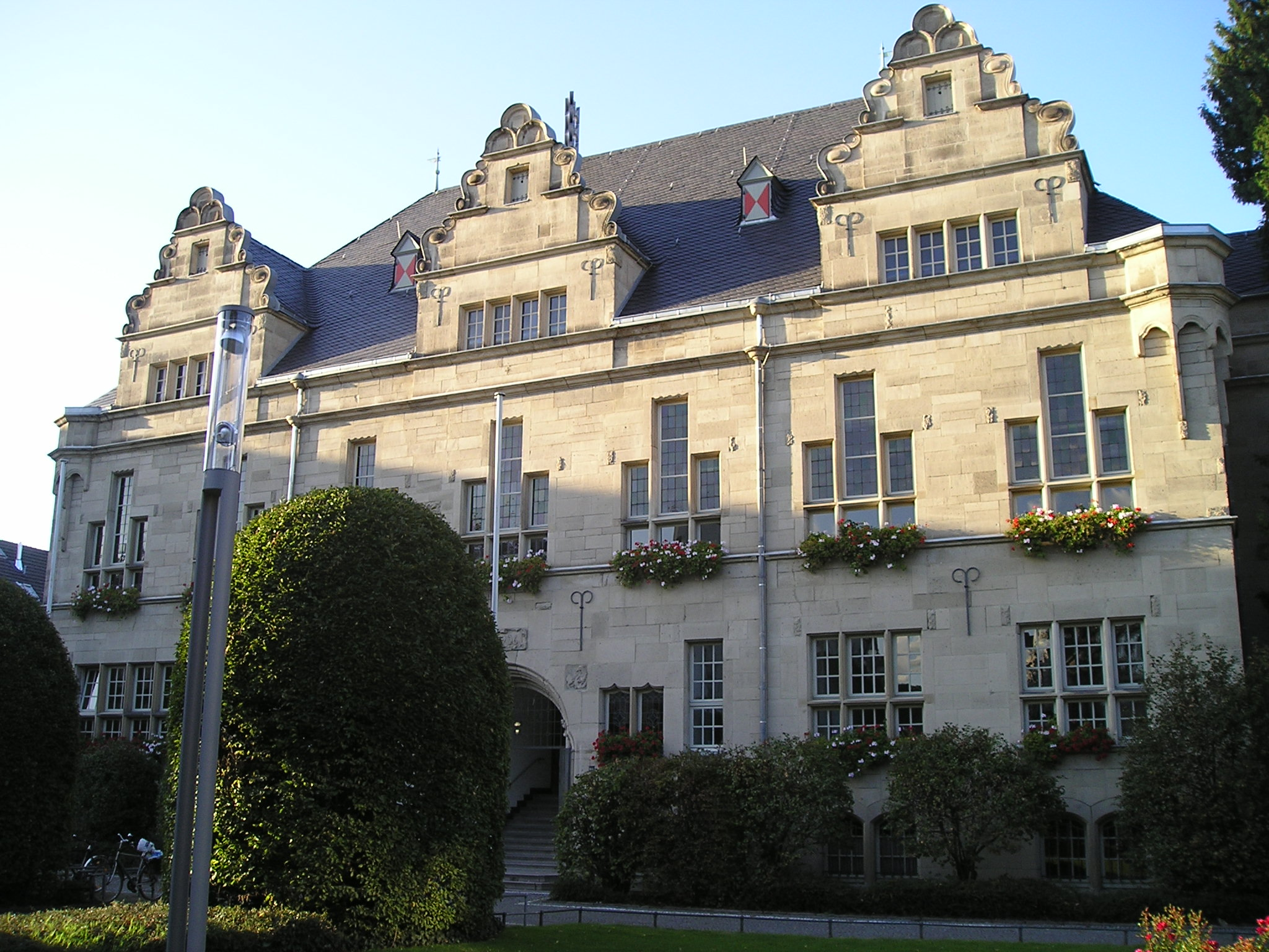 Benrather Rathaus.JPG